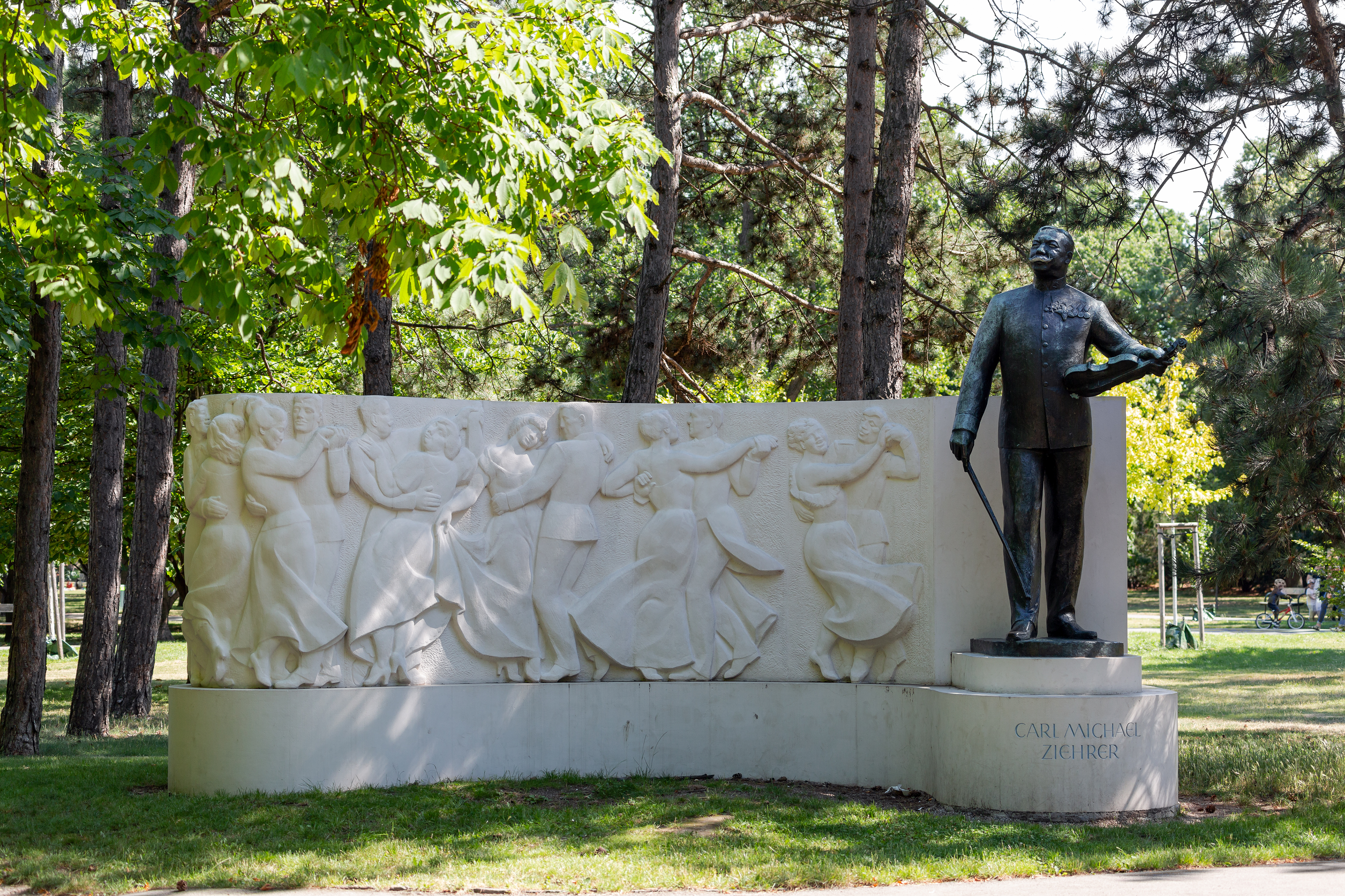 Denkmal für Carl Michael Ziehrer im Wiener Prater